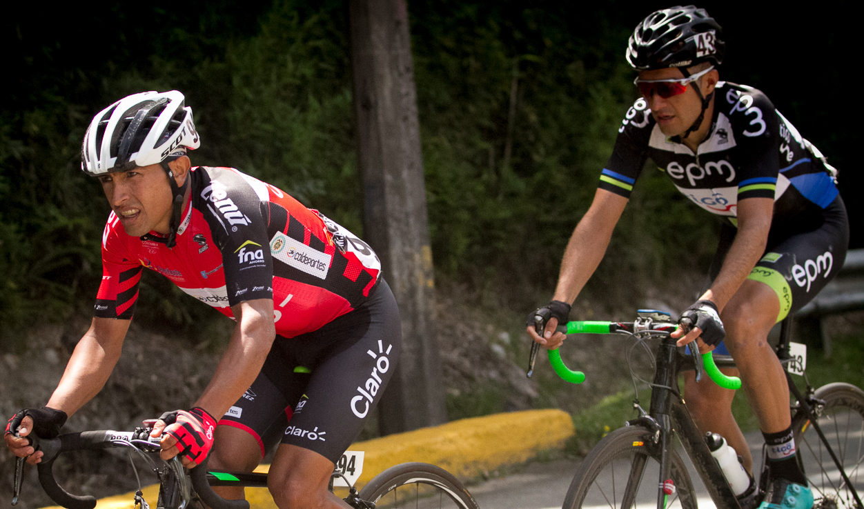 Et.3 Clásico RCN 2016 Miguel Ángel Rubiano y Juan Pablo Suárez.